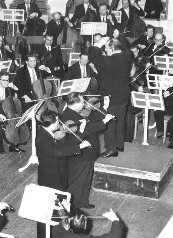 Zentralbild-Zimontkowski Quasch-Krz 24.4.1957 David und Igor Oistrach gastierten in Berlin Die beiden begabten Geigenvirtousen aus der Sowjetunion David und Igor Oistrach gaben am 14.4.1957 ein Konzert in der Deutschen Staatsoper in Berlin. Es spielte das Leipziger Gewandhausorchester unter der Leitung von Nationalpreisträger Franz Konwitschny. UBz: David und Igor Oistrach (links) während des Konzertes. Am Dirigentenpult Franz Konwitschny.